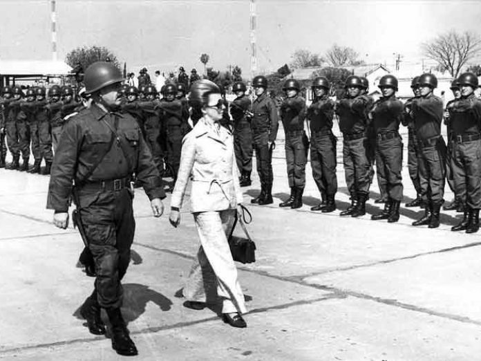 Operativo Independencia para desarticular al ERP. Tucumán, Argentina.